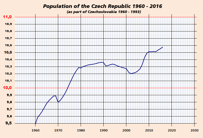 Population graf of the Czech Republic 1960 - 2016